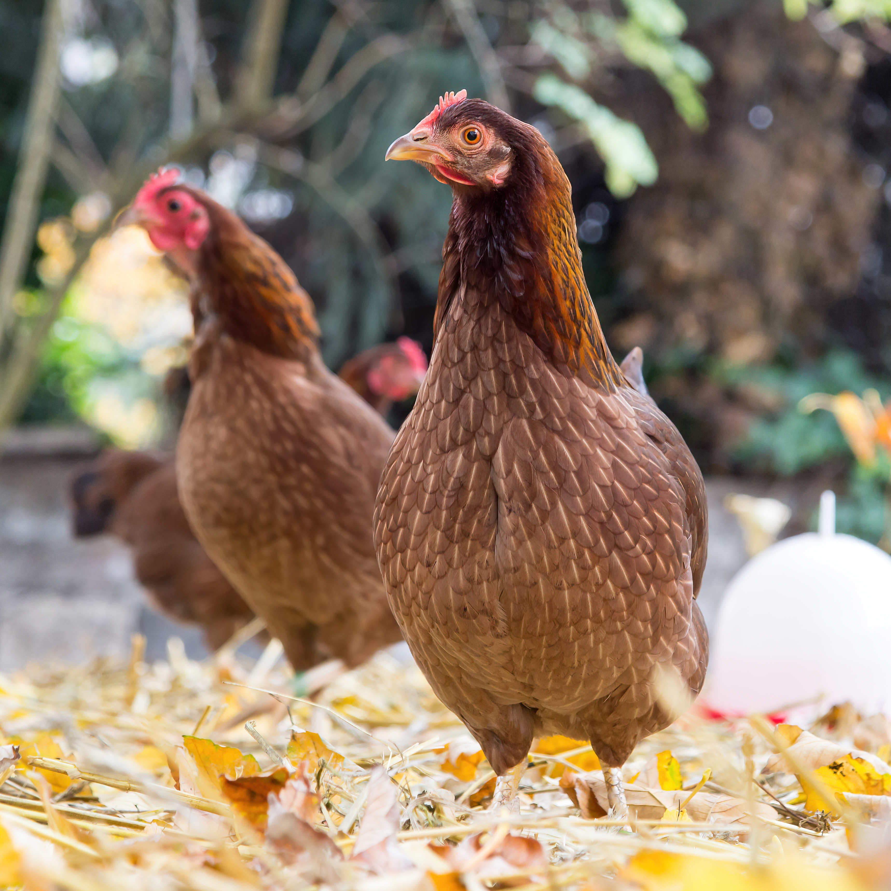 Zwerg-Welsumer-Huhn